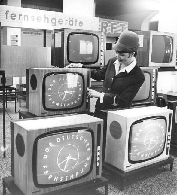 Leipzig, Messe, RFT-Sortiment, Fernseher Zentralbild Gahlbeck ku-sz 1.3.1968 Leipziger Frühjahrsmesse 1968 - (Städt. Kaufhaus) RFT bietet ein völlig neues Sortiment an. Unser Foto zeigt das Sortiment des RFT im Messehaus Städtisches Kaufhaus mit 47er und 49er implosionsgeschützten Bildröhren der Typen "Stella" und "Ines".